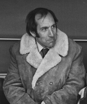 Feijenoord tegen FC Twente 3-0; hulptrainer Ad Zonderland (Feijenoord) o.a., kop